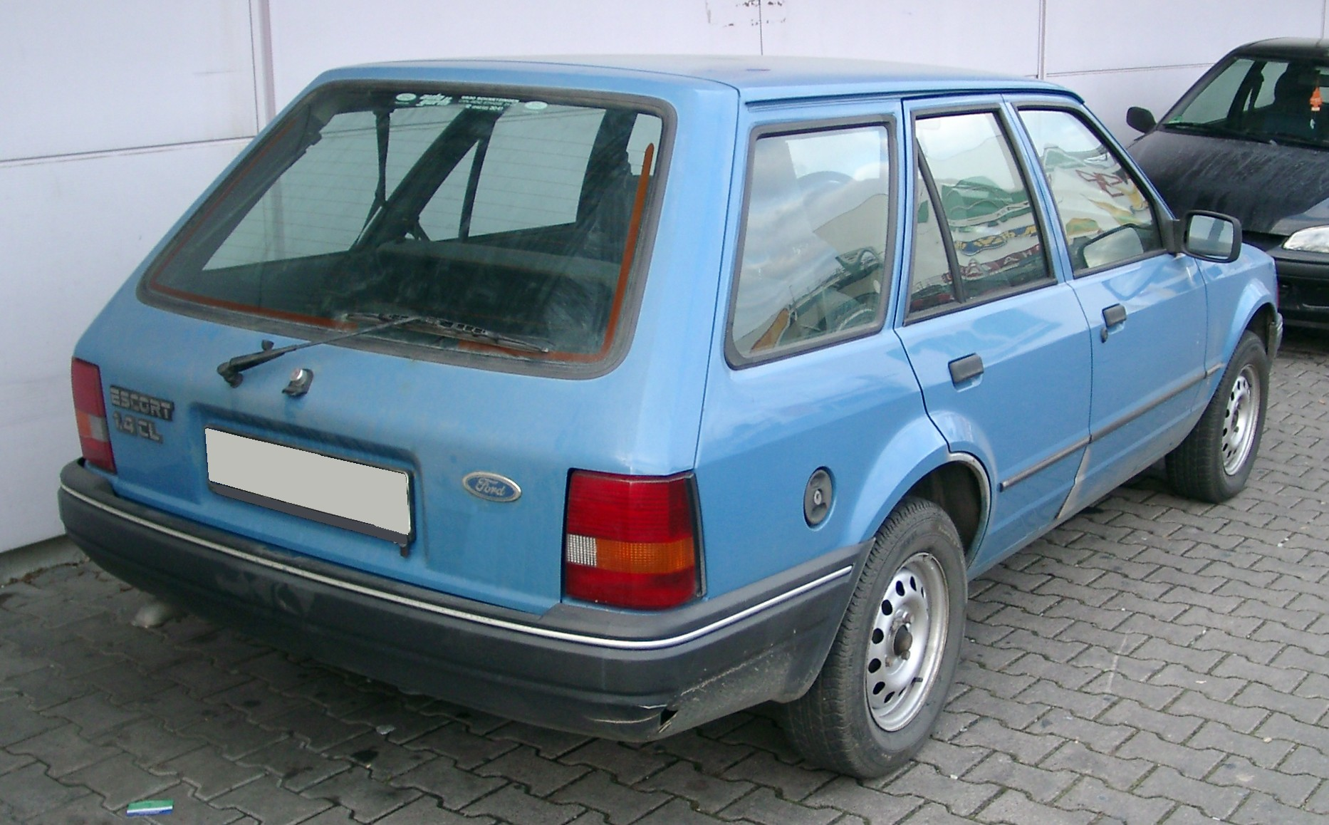 Ford Escort MK4 Kombi